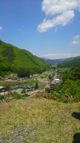 長野県伊那市高遠町長藤板山から断層谷を一望できます。露頭は正法寺の裏にあります。